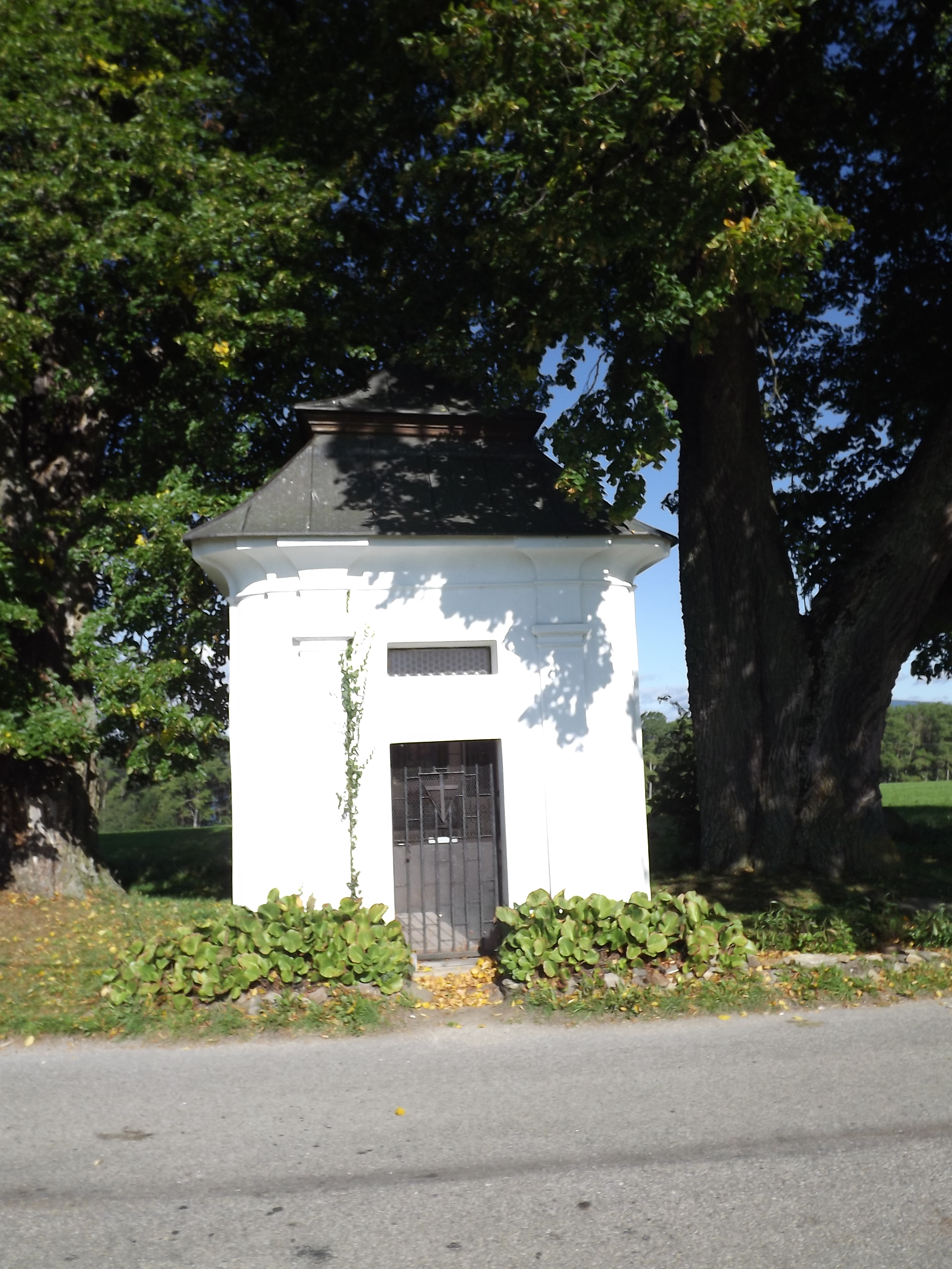 Kaple Panny Marie (Dolní Vltavice), u silnice z Černé v Pošumaví, Dolní Vltavice